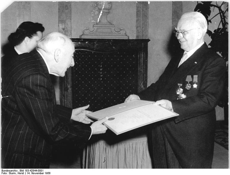 Zentralbild-Sturm Stu-Qu 14.11.1956 Präsident Wilhelm Pieck verlieh Vaterländischen Verdienstorden Am 14. Nov. 1956 verlieh der Präsident der Deutschen Demokratischen Republik, Wilhelm Pieck, in seinem Amtssitz Schloß Niederschönhausen den Vaterländischen Verdientsorden in Silber an Nationalpreisträger Prof. Dr. Dr. h.c. Viktor Klemperer und Herrn Bruno Lau (Vorsitzender des Rates des Kreises Grimma). Den Vaterländischen Verdienstorden in Bronze erhielten Dr. rer. pol. Werner Buch, Herr Rudolf Daumann (Schriftsteller) und Herr Gotthard Feist (Mitarbeiter des Bundesvorstandes des FDGB). (Näheres siehe ADN-Meldung vom 14.11.56) UBz: Der Präsident überreicht Prof. Dr. Dr. h.c. Viktor Klemperer die Urkunde.